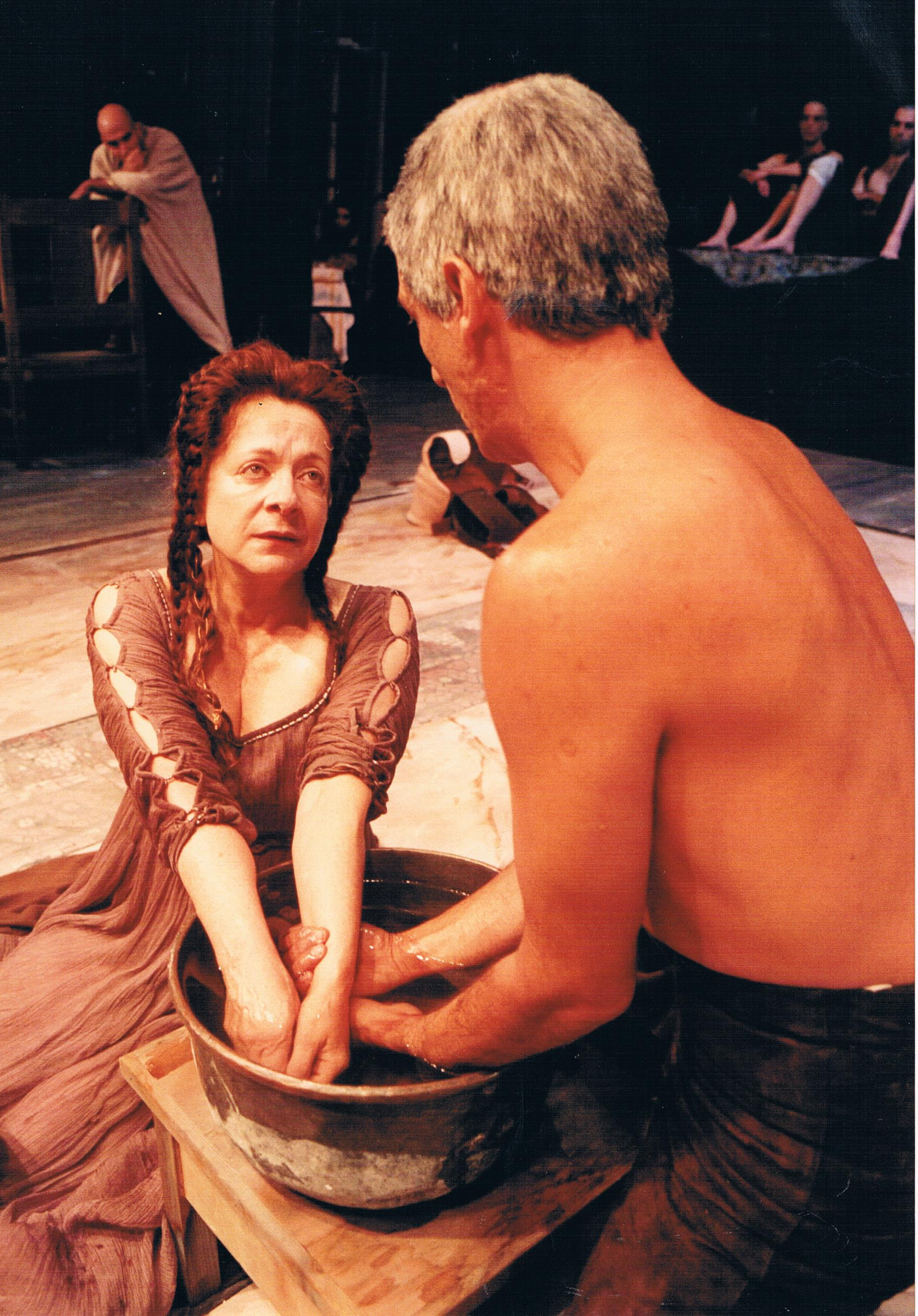 רבקה גור בהצגה "יהוא". תיאטרון "הבימה"